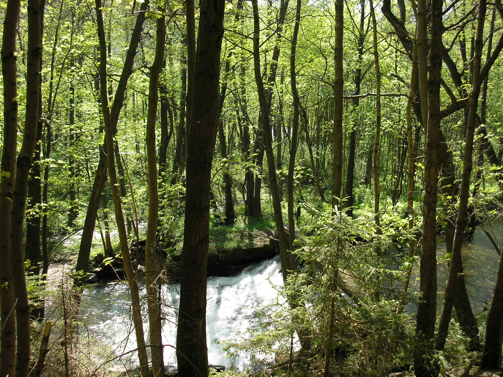 Das Flächennaturdenkmal "Ilmauenwald" zwischen Grenzhammer und Langewiesen (Thüringen).